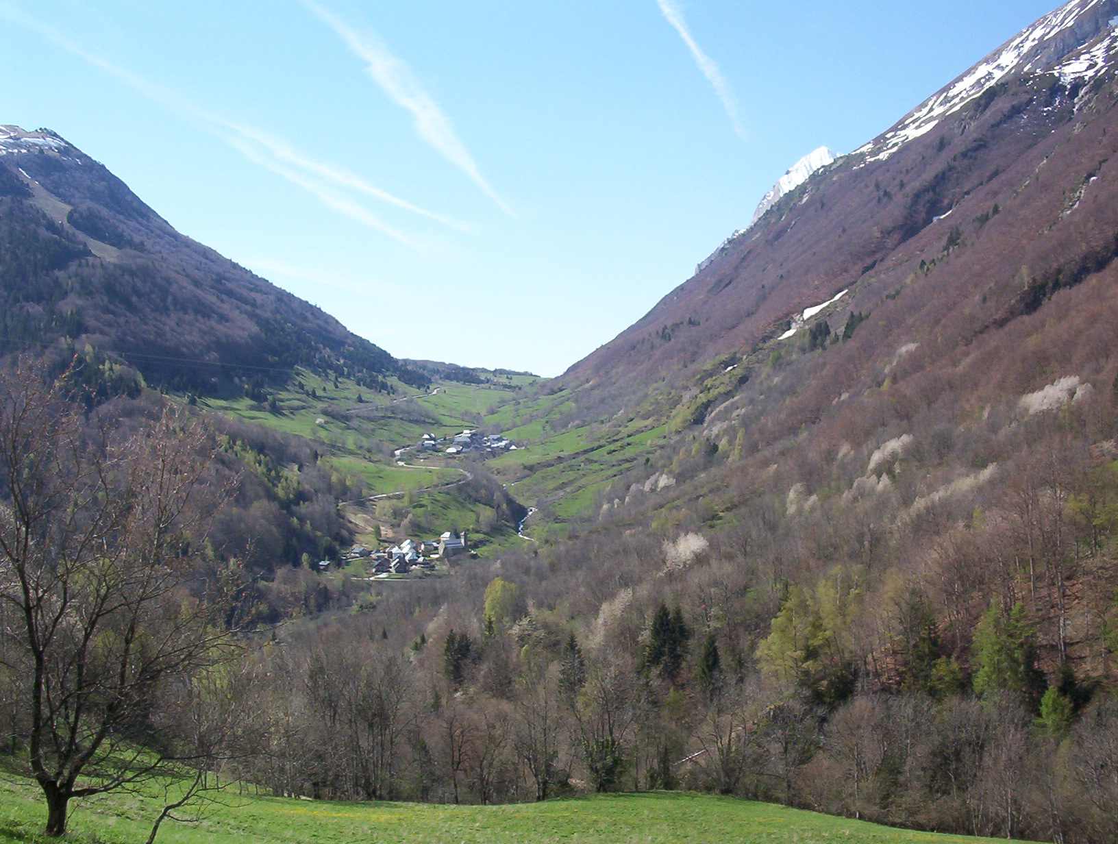 Le col d'Ornon au printemps vu depuis la route du village d'Ornon